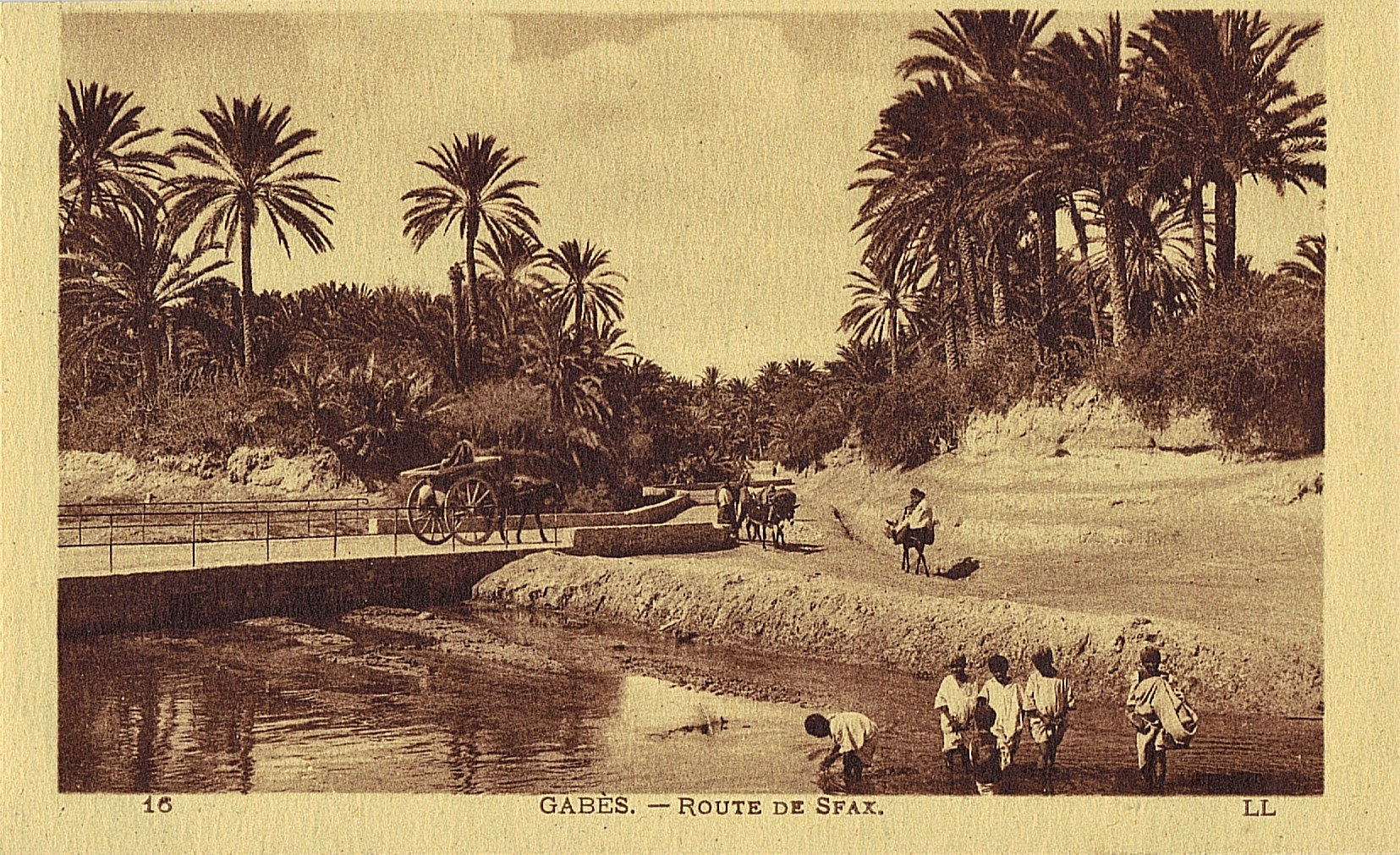 Gabes (Tunisie) route de Sfax